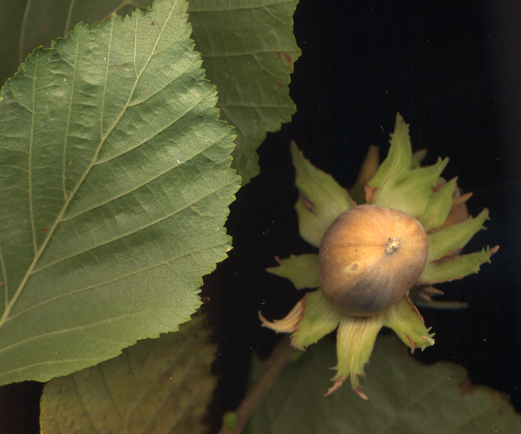 photographie de noisette mure dans son involucre